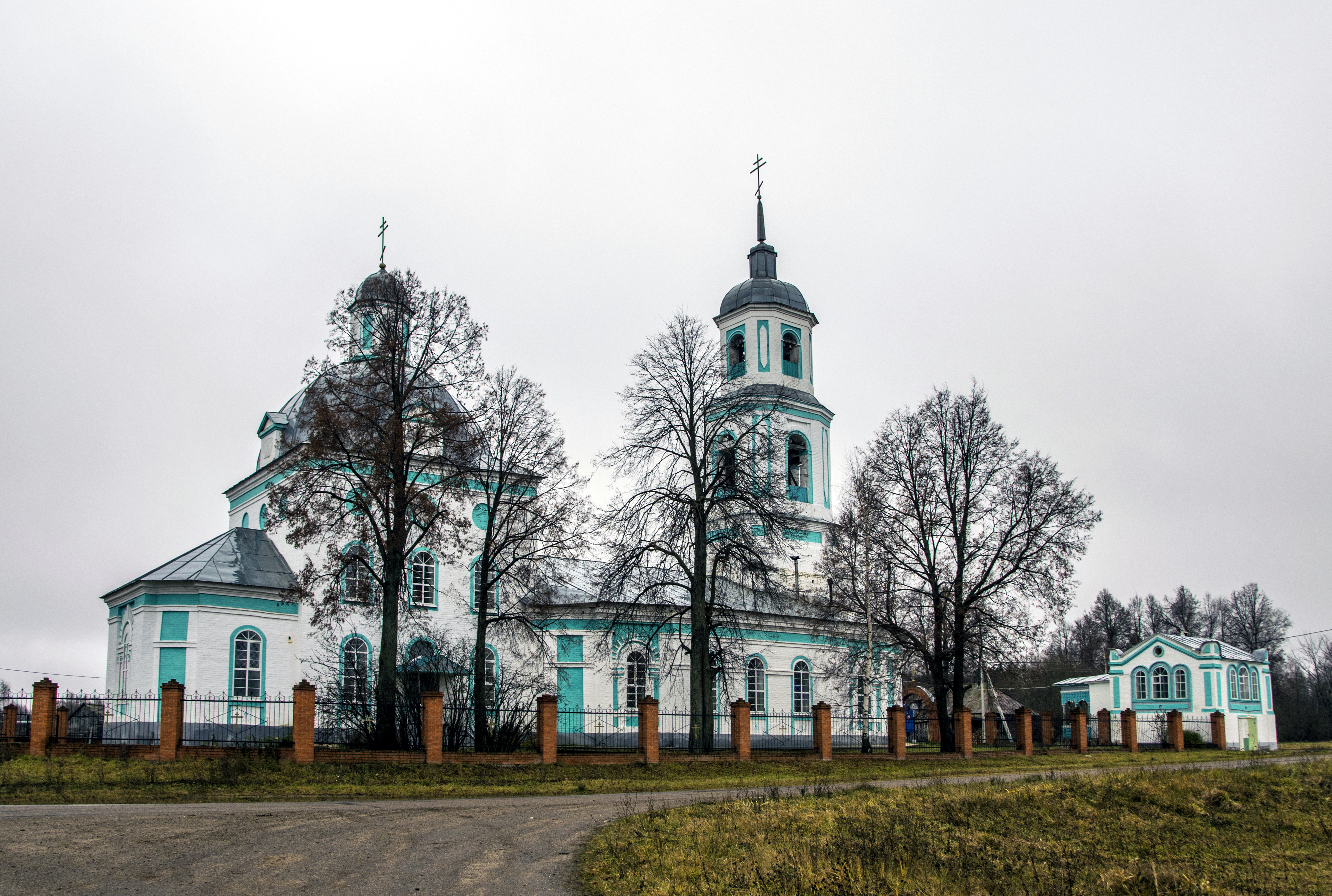 Церковь Воздвижения Креста Господня: Кукнур, Сернурский район, Марий Эл